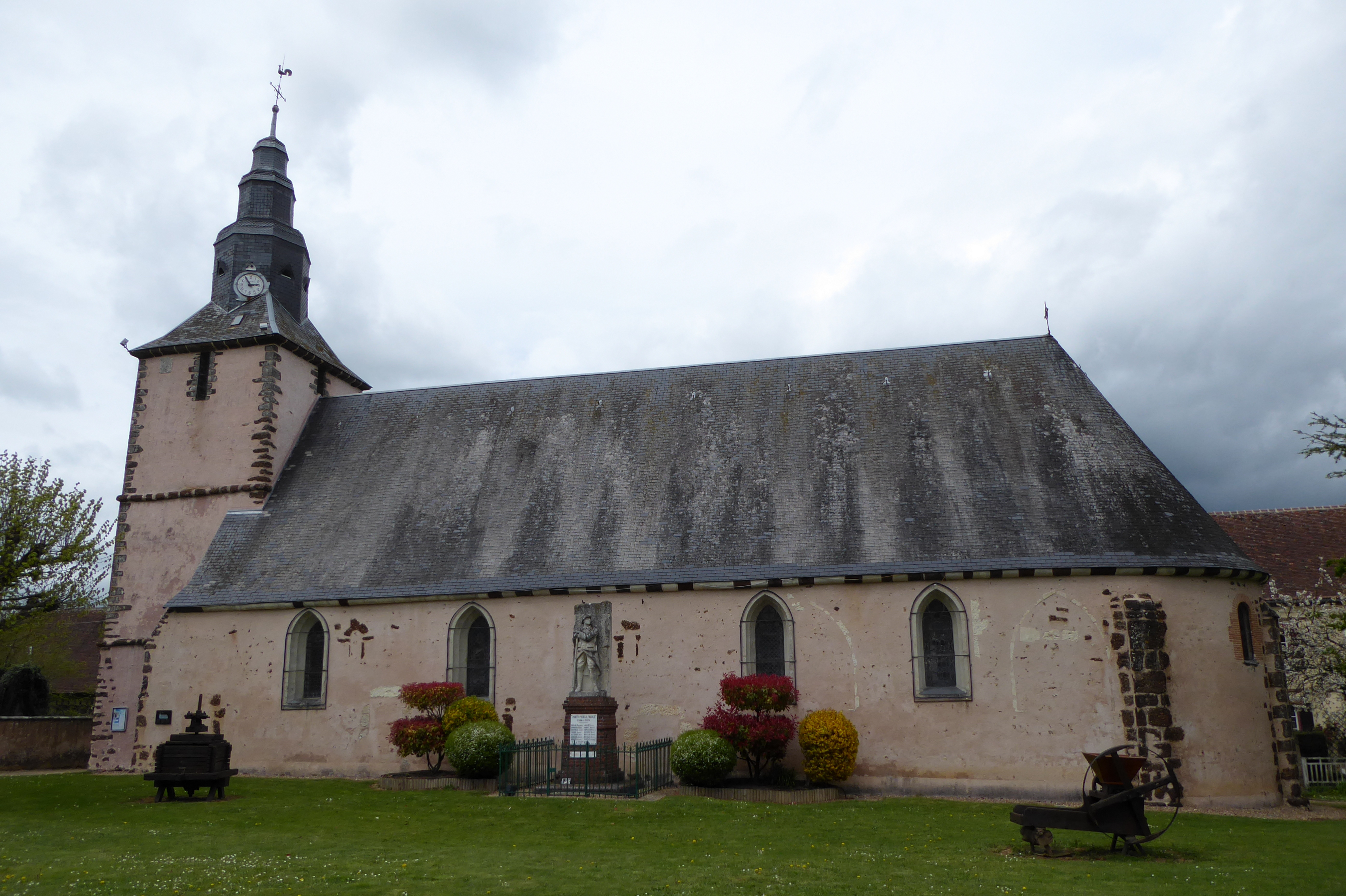 église Saint-Lubin et monument aux morts par F. Charpentier, Chassant, Eure-et-Loir (France).